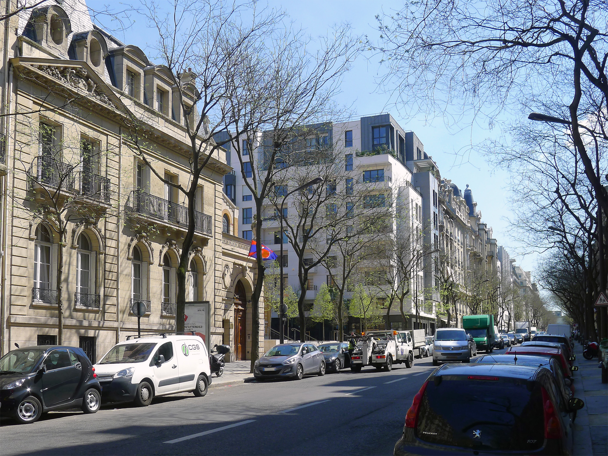 Avenue Raymond-Poincaré - Paris XVI